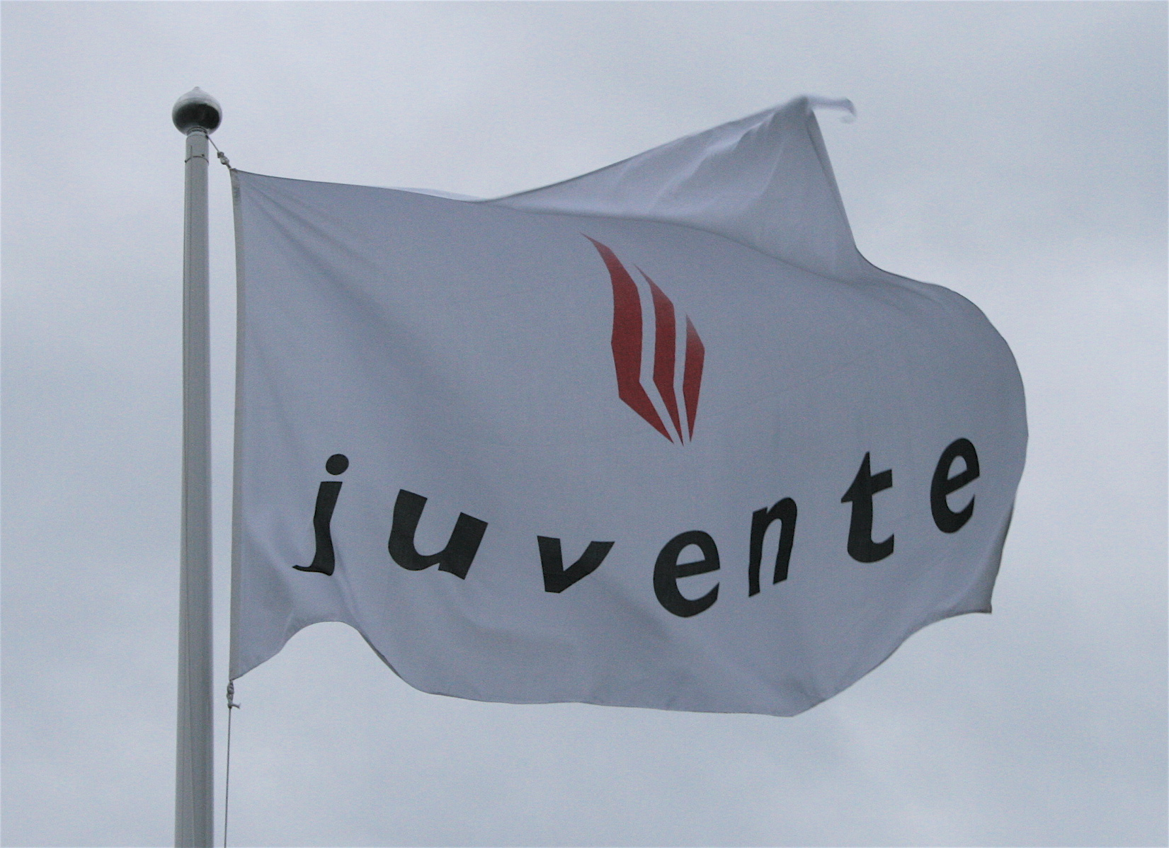 Juvente-flagg